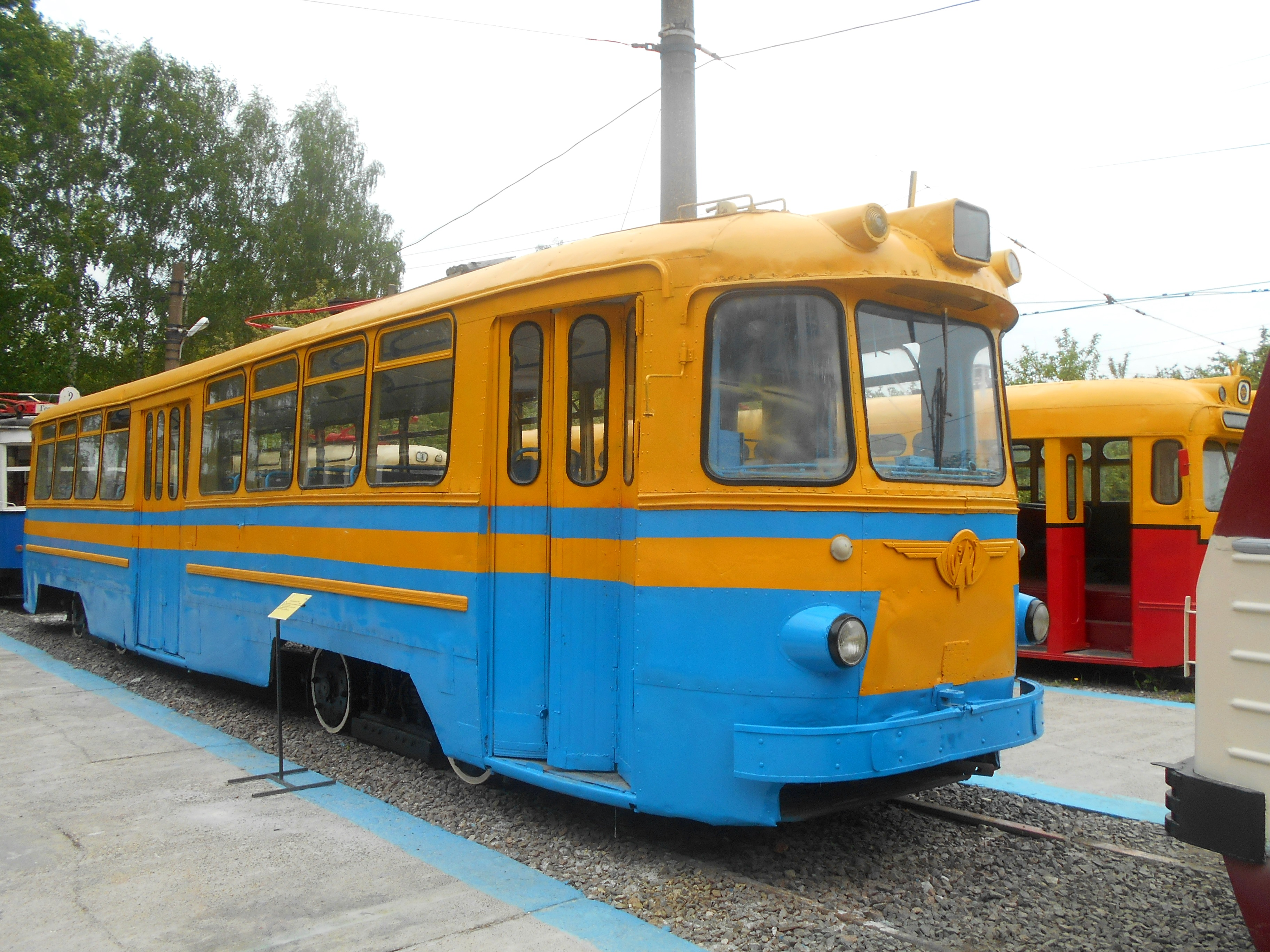 Музейный трамвай ЛМ-57 в Нижнем Новгороде